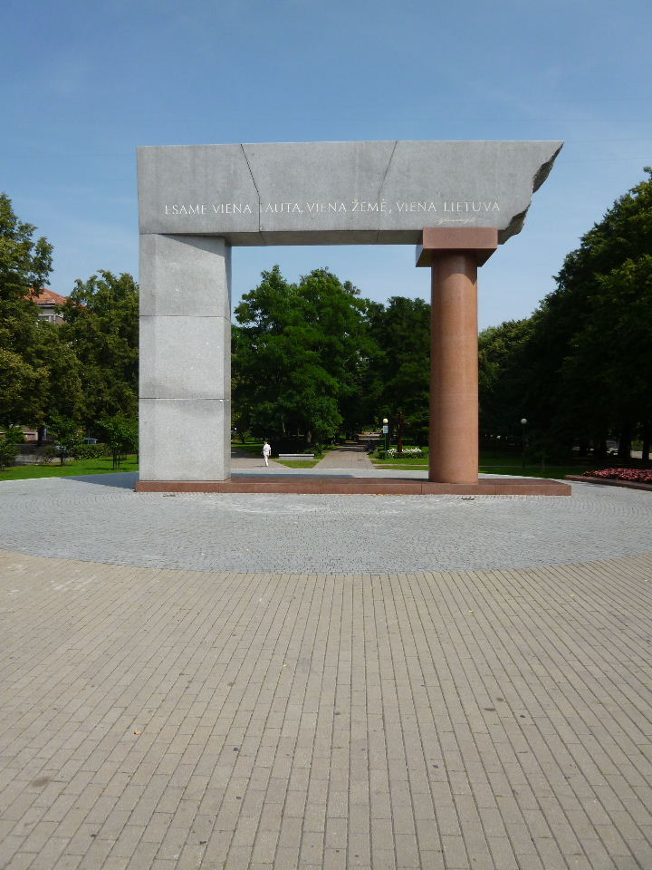 "Arka" ("Der Bogen") - Klaipėda - Das Denkmal wurde im Jahre 2003 anlässlich des 85. Jahrestages des Tilsit-Aktes und des 80. Jahrestages der Vereinigung Litauens mit dem Memelgebiet gebaut. Die kleine Säule aus rotem Granit symbolisiert Kleinlitauen, die quadratische graue Granitsäule Großlitauen. Die Abbruchkante oberhalb der roten Säule symbolisiert das Königsberger Gebiet (heutiges Gebiet um Kaliningrad), das jetzt zu Russland gehört. Am oberen Teil des Denkmals ist ein Spruch der Schriftstellerin Ieva Simonaitytė gemeißelt: „Wir sind ein Volk, ein Land, ein Litauen".